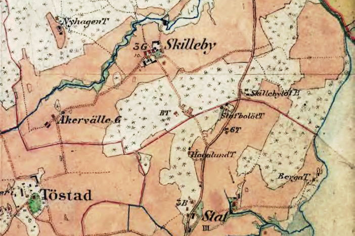 Del av Häradsekonomiska kartan visande Skilleby och Stavs gård (Staf)